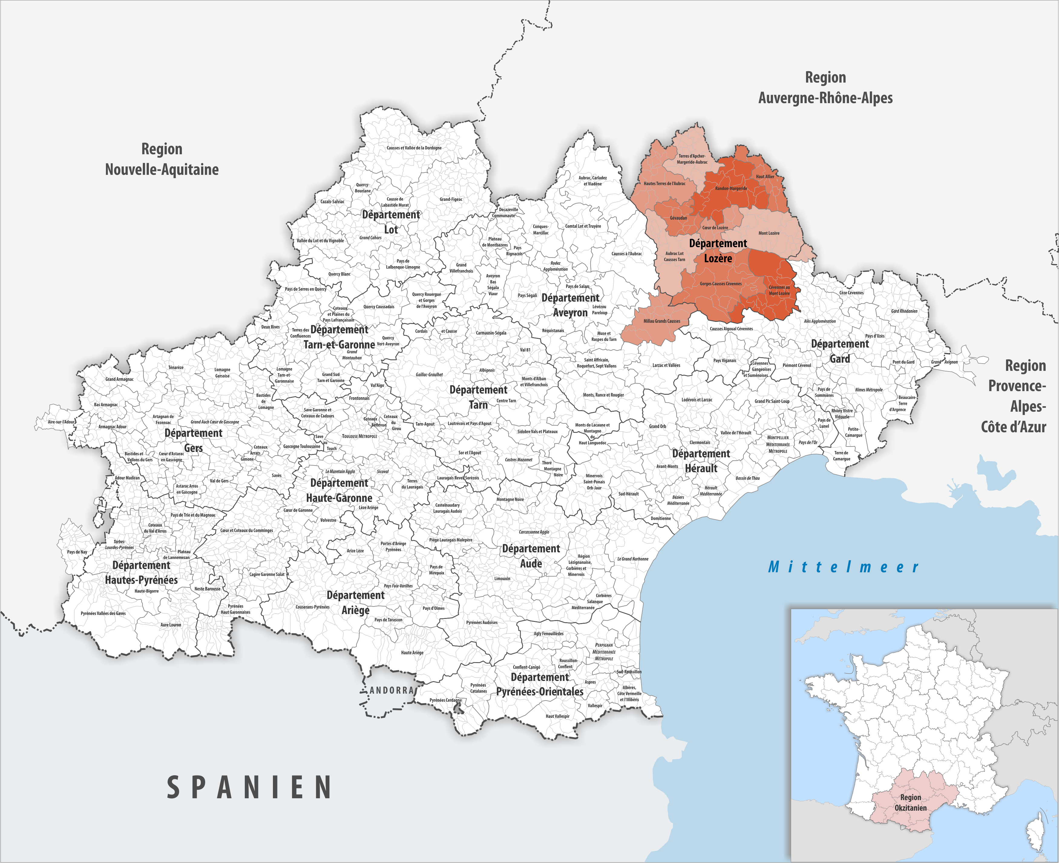 Gemeindeverbände im Département Lozère